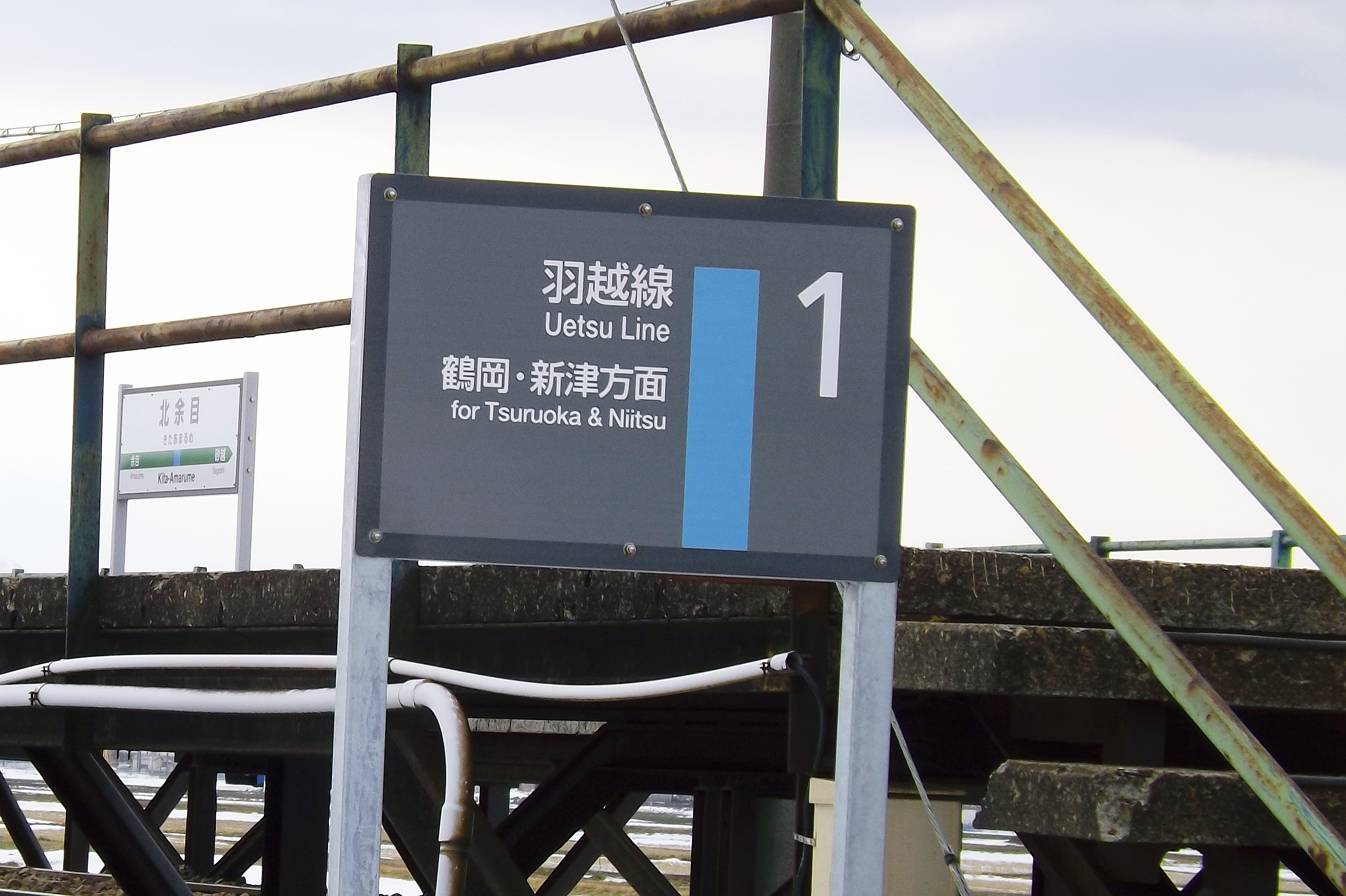 上下ホーム階段横に新設されたホーム番線案内。